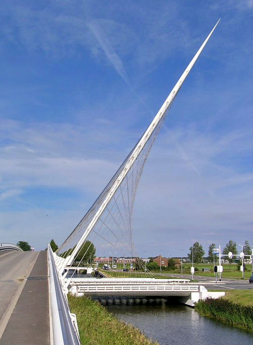 Calatrava-Bréck Citer